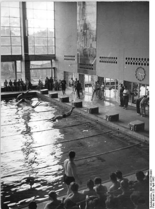 Magdeburg, Hallenbad Zentralbild Biscan 23.4.1962 Modernstes Hallenbad der DDR eröffnet Am 27.4.1962 wurde die neuerbaute Elbe-Schwimmhalle in Magdeburg mit einem Wettschwimmen der am Bau beteiligten Arbeiter eröffnet. Das Schwimmbad ist nach dem neuesten Stand der Technik gebaut und eingerichtet. Das Schwimmbecken ist 50 x 20 Meter groß und hat acht Kampfbahnen, die den internationalen Wettkampfbestimmungen entsprechen. Die Kleiderablagen sind für 500 Badegäste berechnet, die Tribüne für 1200 Zuschauer. UBz: Start zum ersten Wettkampf in dem neuen Bad. Teilnehmer des Wettschwimmens sind die Bauarbeiter, Monteure, Installateure, Techniker und Bauingenieure, die das Bad gebaut haben.